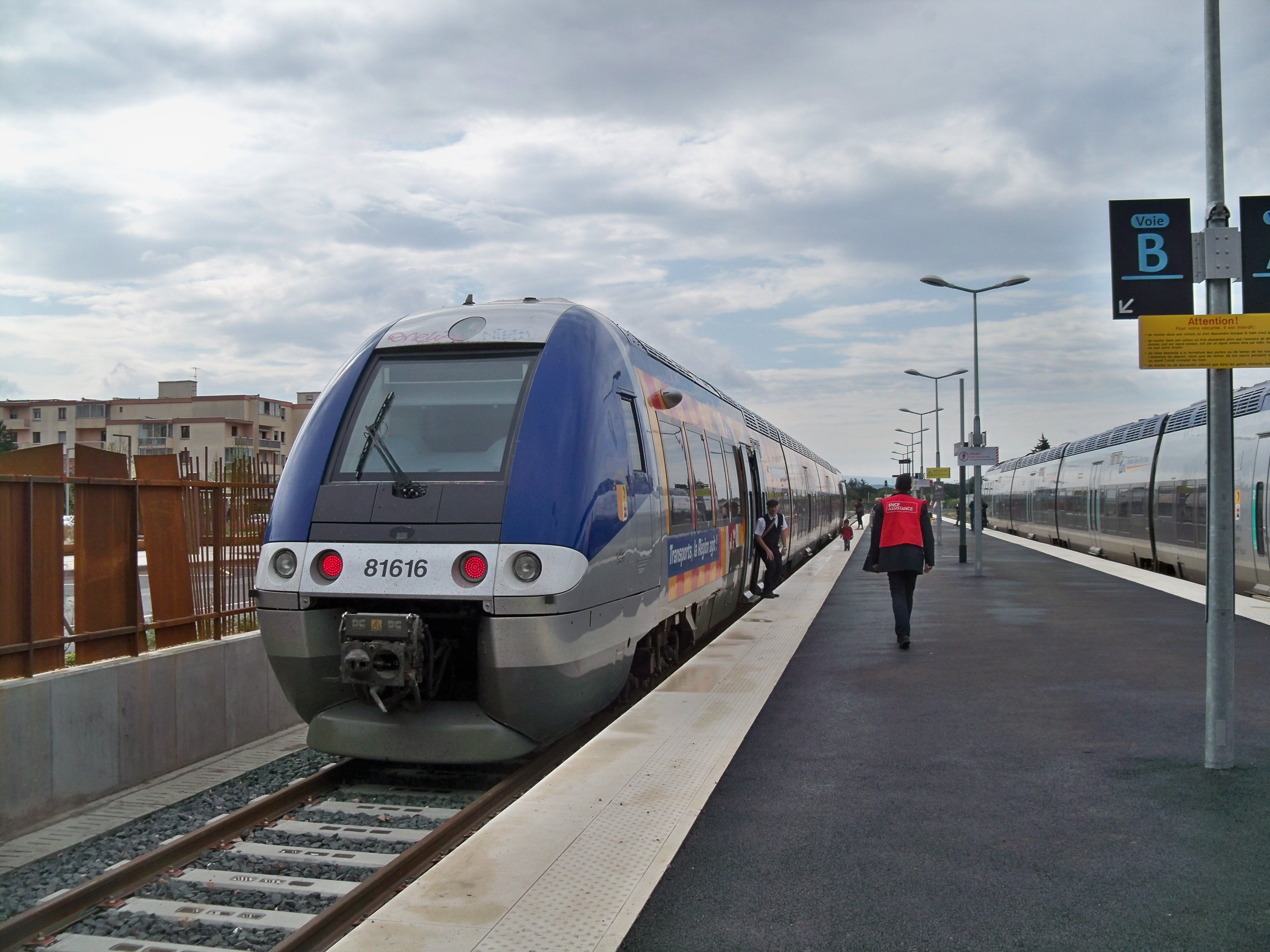 quai à la gare de Carpentras